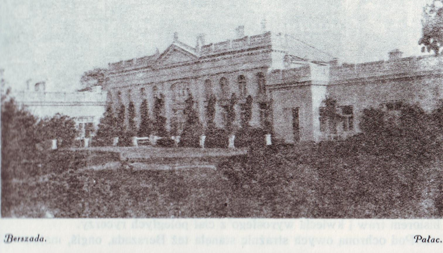 Bereszada